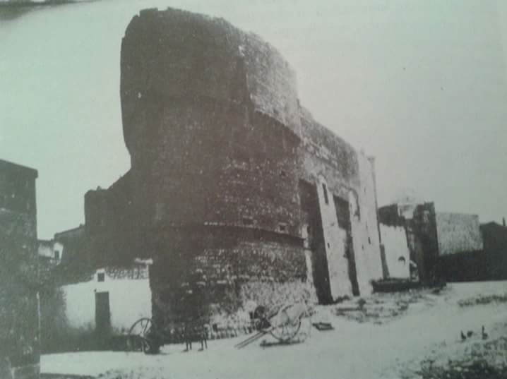 Foto d'epoca castello di Carovigno